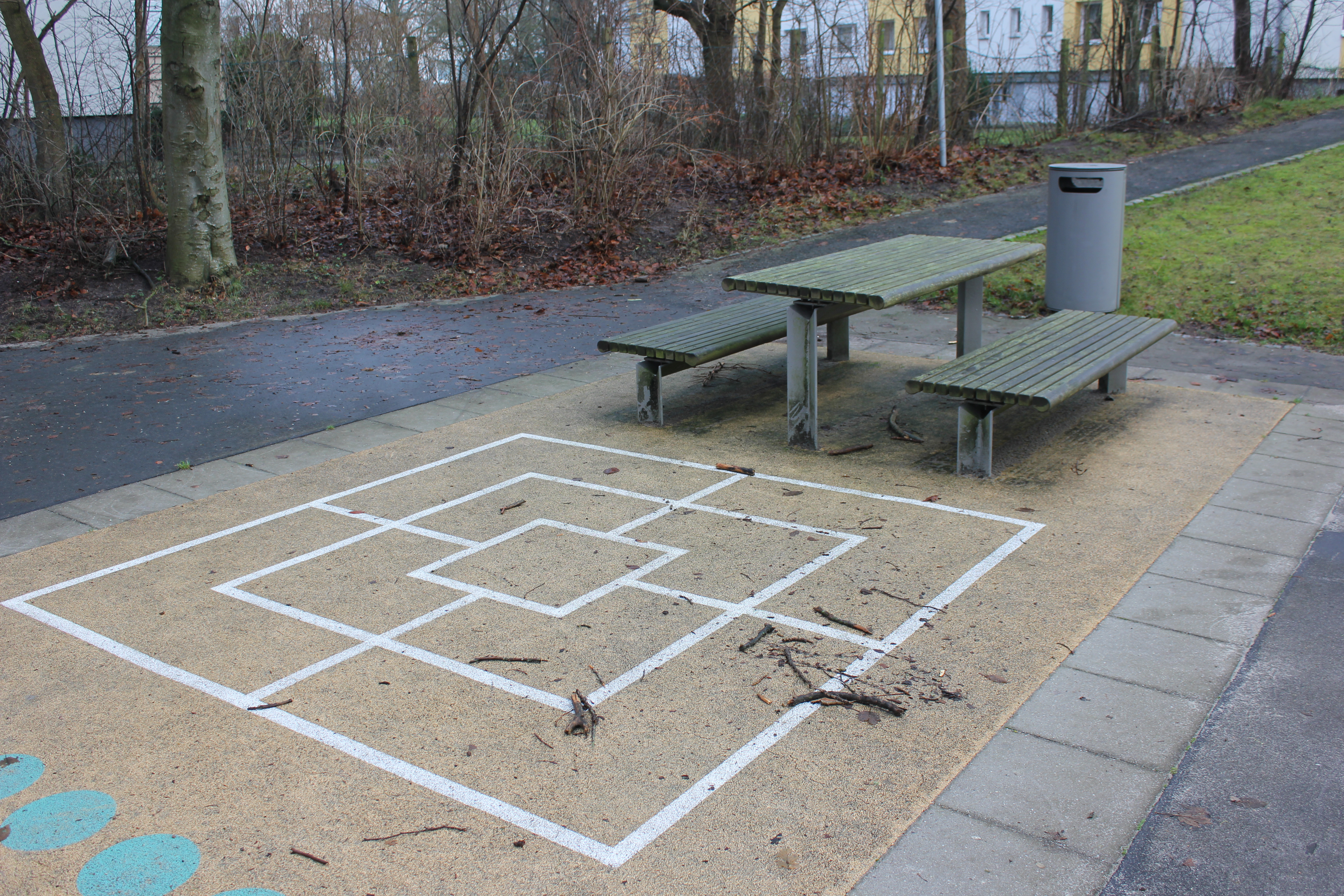 Mühle-Spiel beim Spielplatz Süderlücke (Flensburg-Mürwik)